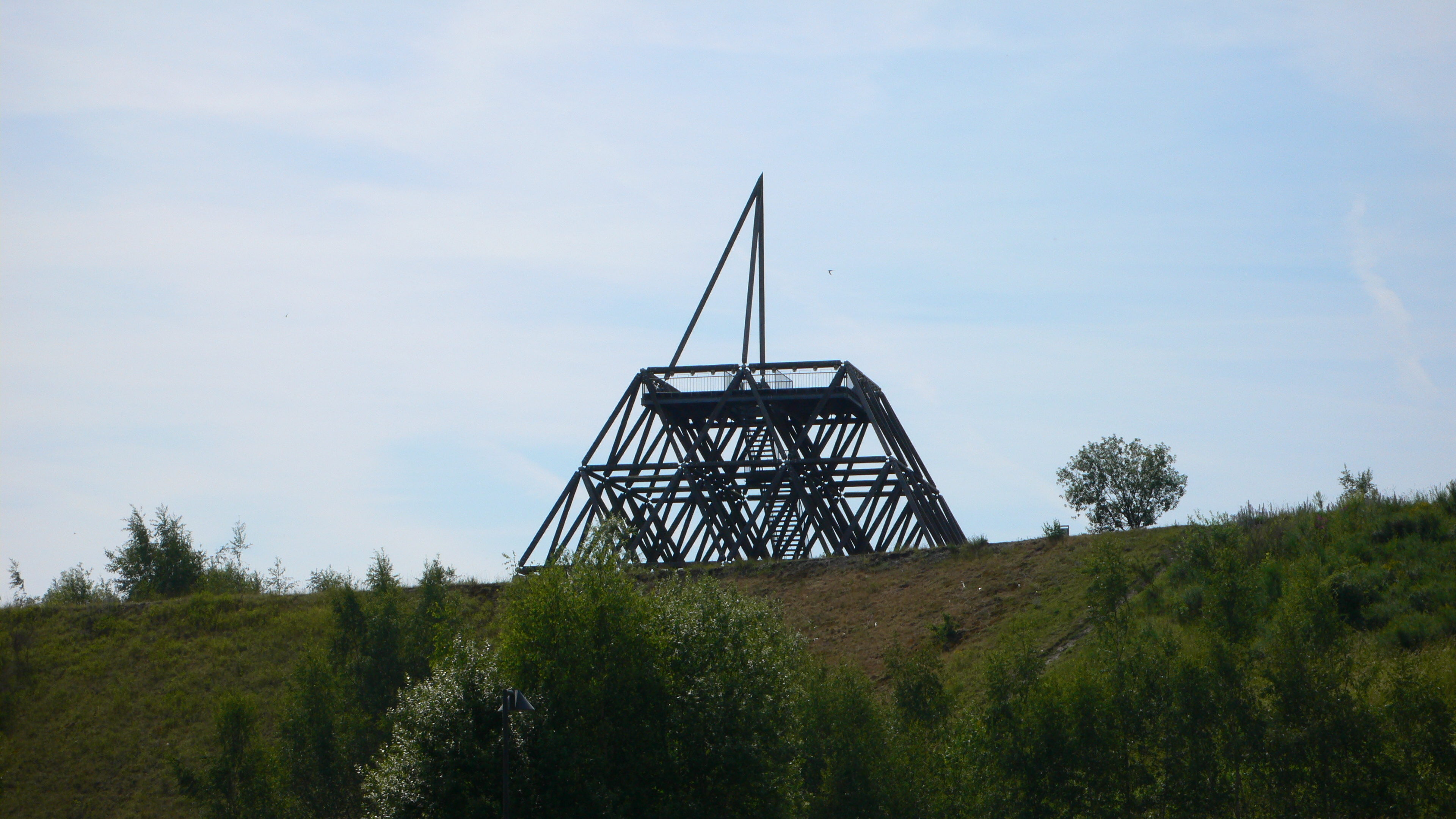 Ein Denkmal auf dem ehemaligen Zechengelände in Waltrop; gebaut aus Grubenholz